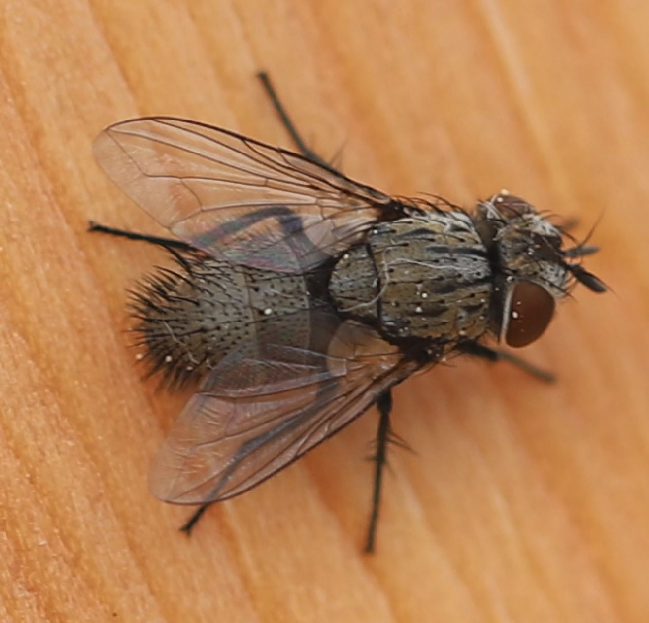 Frisch geschlüpfte Raupenfliege am 17. August 2020